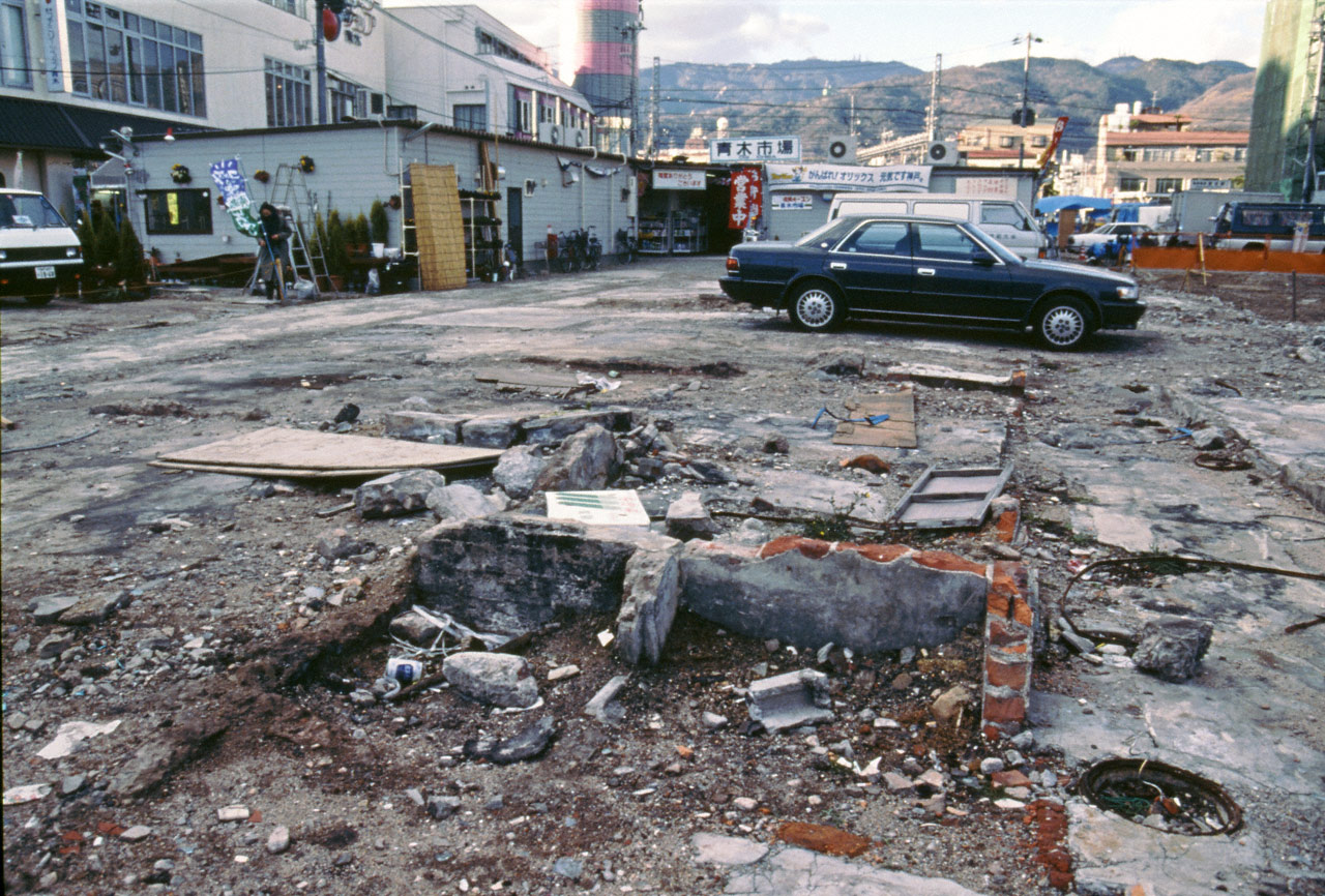 青木地区は復興の遅れた地区の一つ。震災後一年を経た阪神青木駅南側は、まだ爪痕が生々しかった。